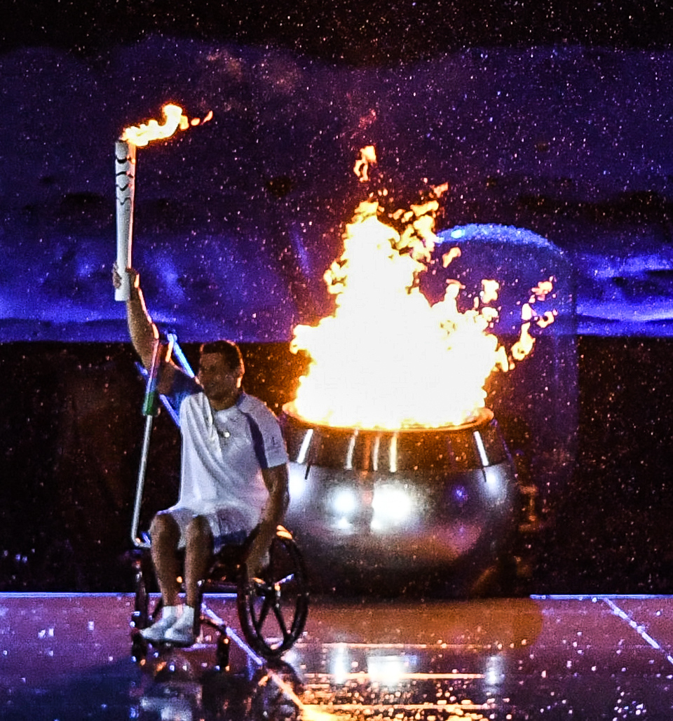 Rio de Janeiro - Cerimônia de abertura dos Jogos Paralmpicos Rio 2016 no Estdio do Maracanã (Tomaz Silva/Agência Brasil)